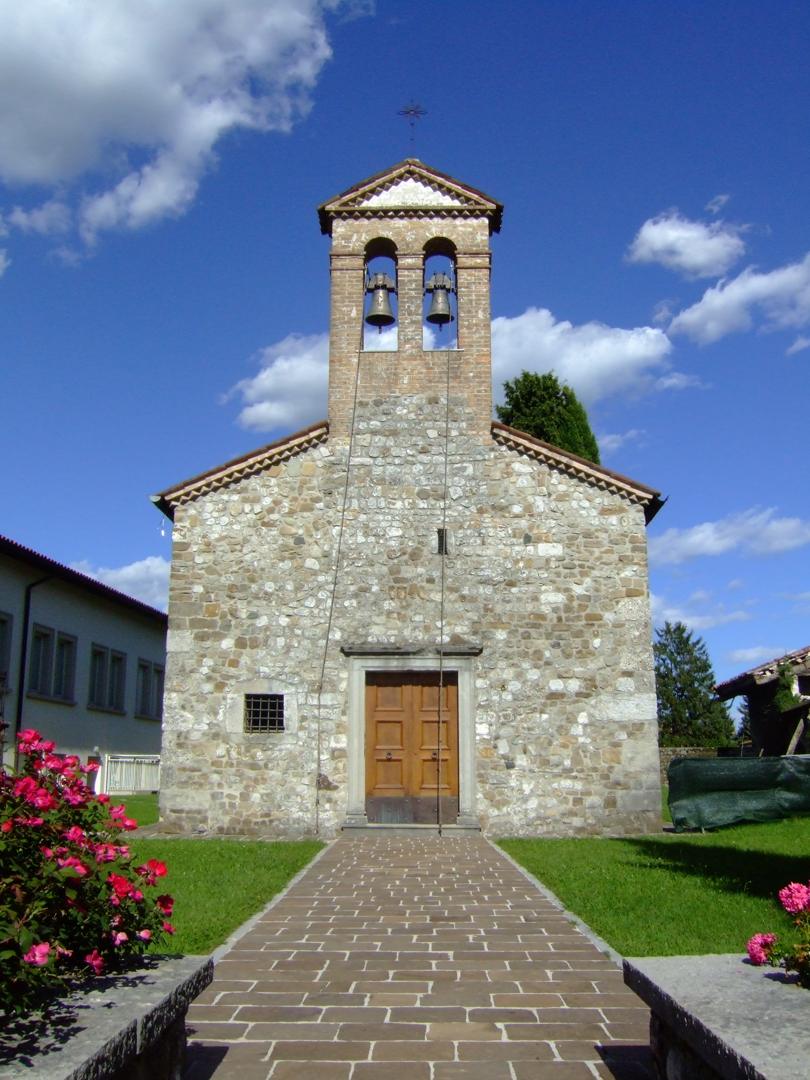 Cavalicco (Udine) - Chiesa di San Leonardo